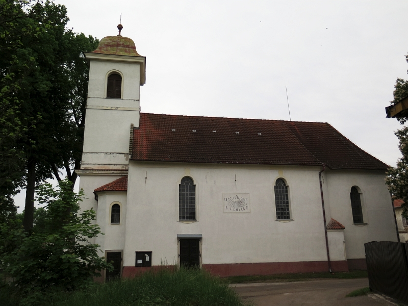 Kostel svatých Šimona a Judy s márnicí, severozápadně od návsi, Roseč.